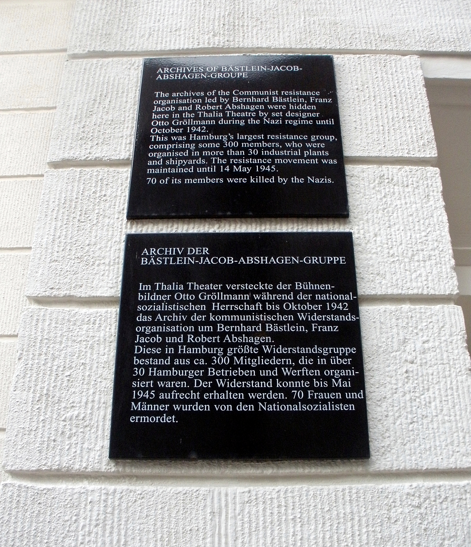 Gedenktafel für die Bästlein-Jacob-Abshagen-Gruppe am Thalia Theater Hamburg, Widerstand gegen den Nationalsozialismus